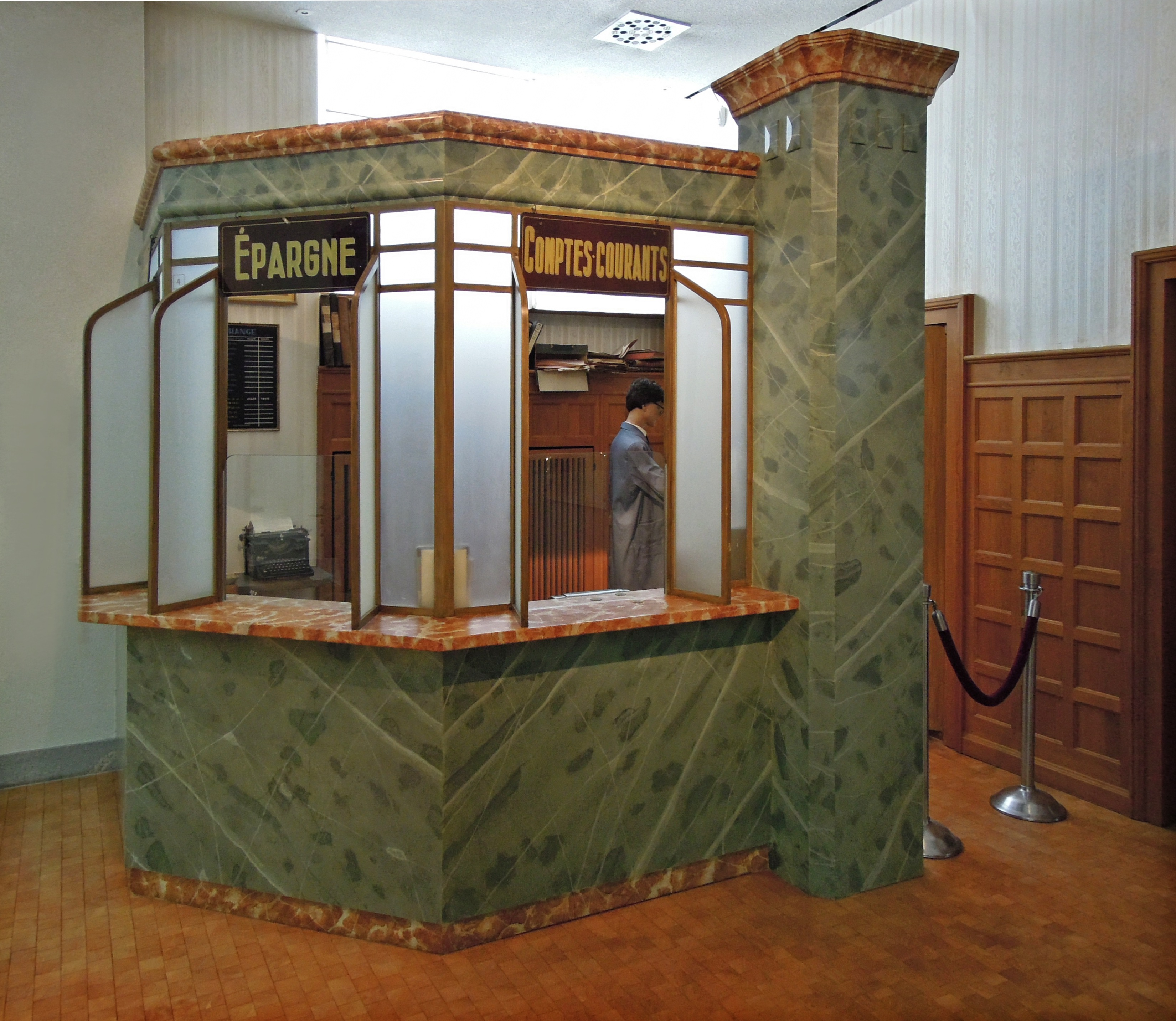 Kundenschalter im Bankmuseum Luxemburg